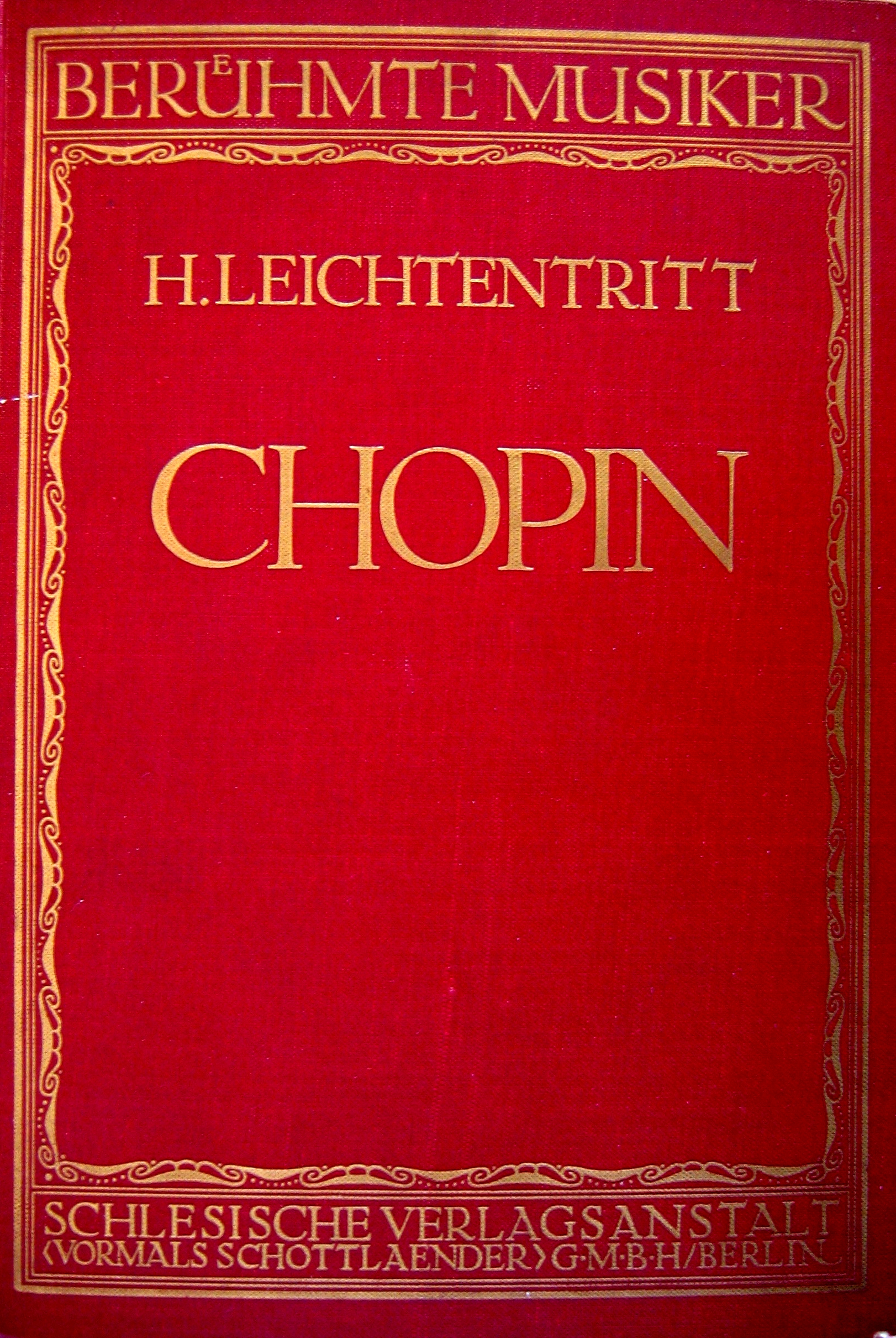 Titelblatt